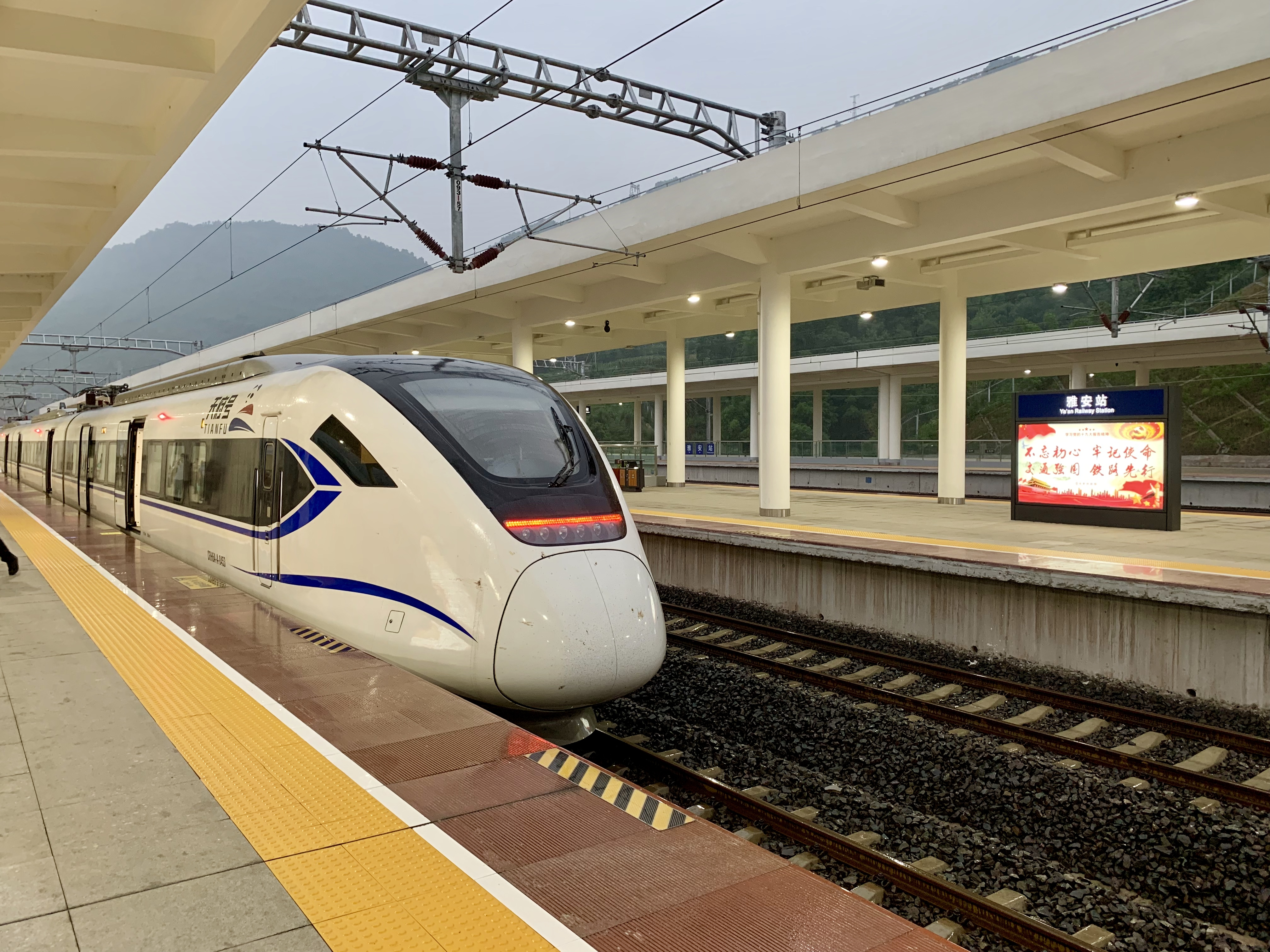 停靠在雅安站的成雅铁路“天府号”CRH6A-A四节编组市域动车组